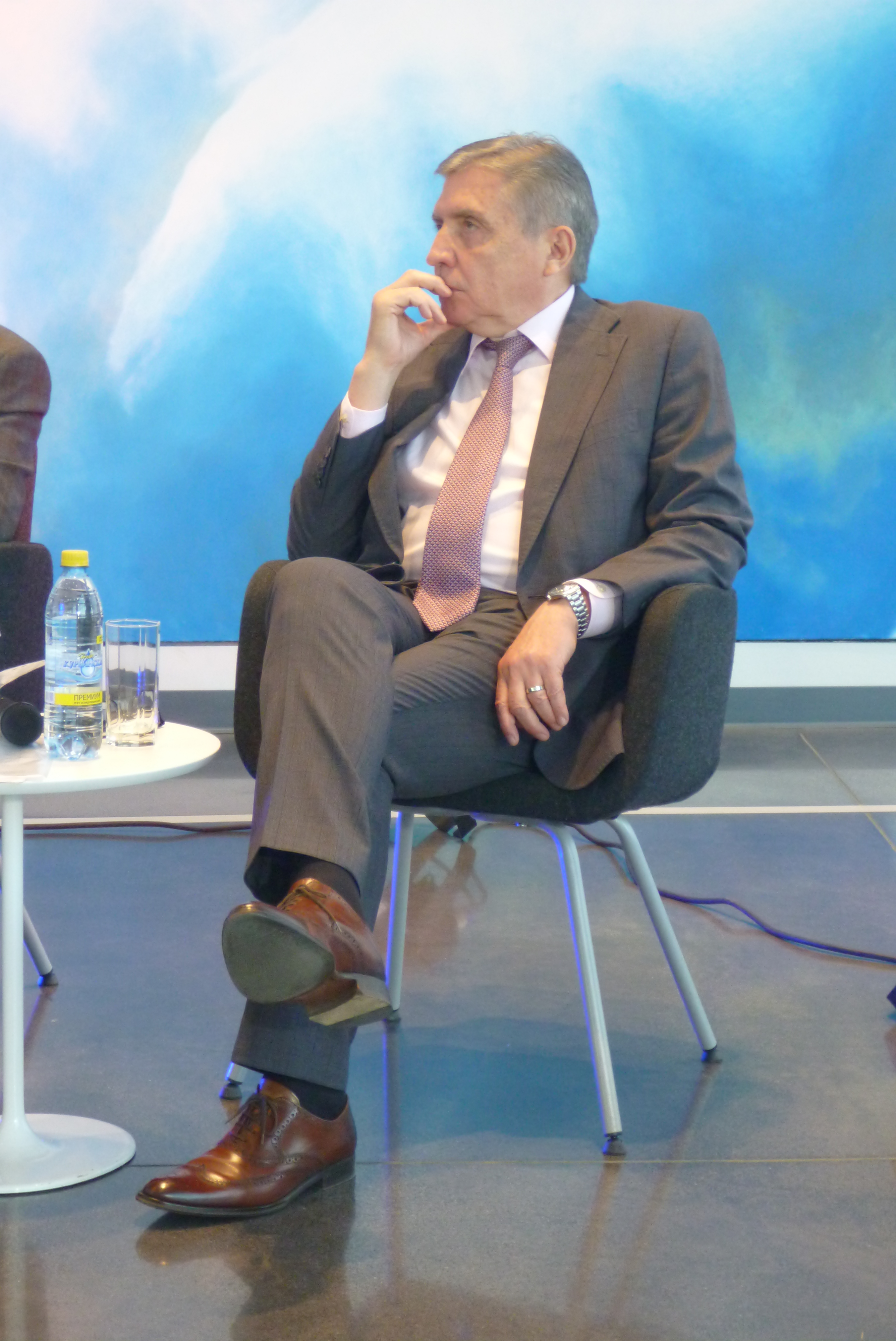 Александр Алексеевич Дроздов исполнительный директор Президентского центра Бориса Ельцина в Ельцин-центре 30 мая 2019 года